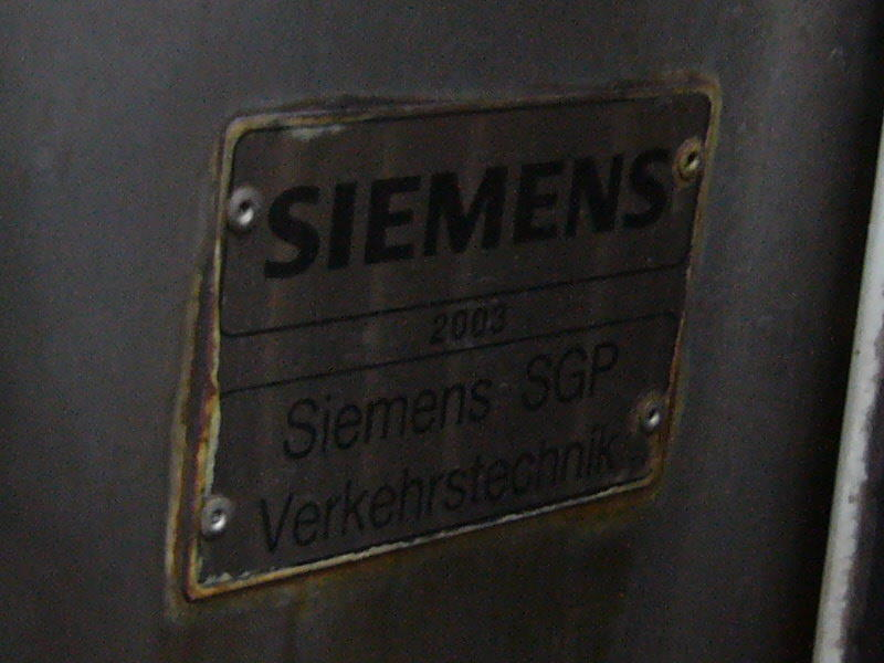 台北捷運341型電聯車車廂間外側的西門子銘板